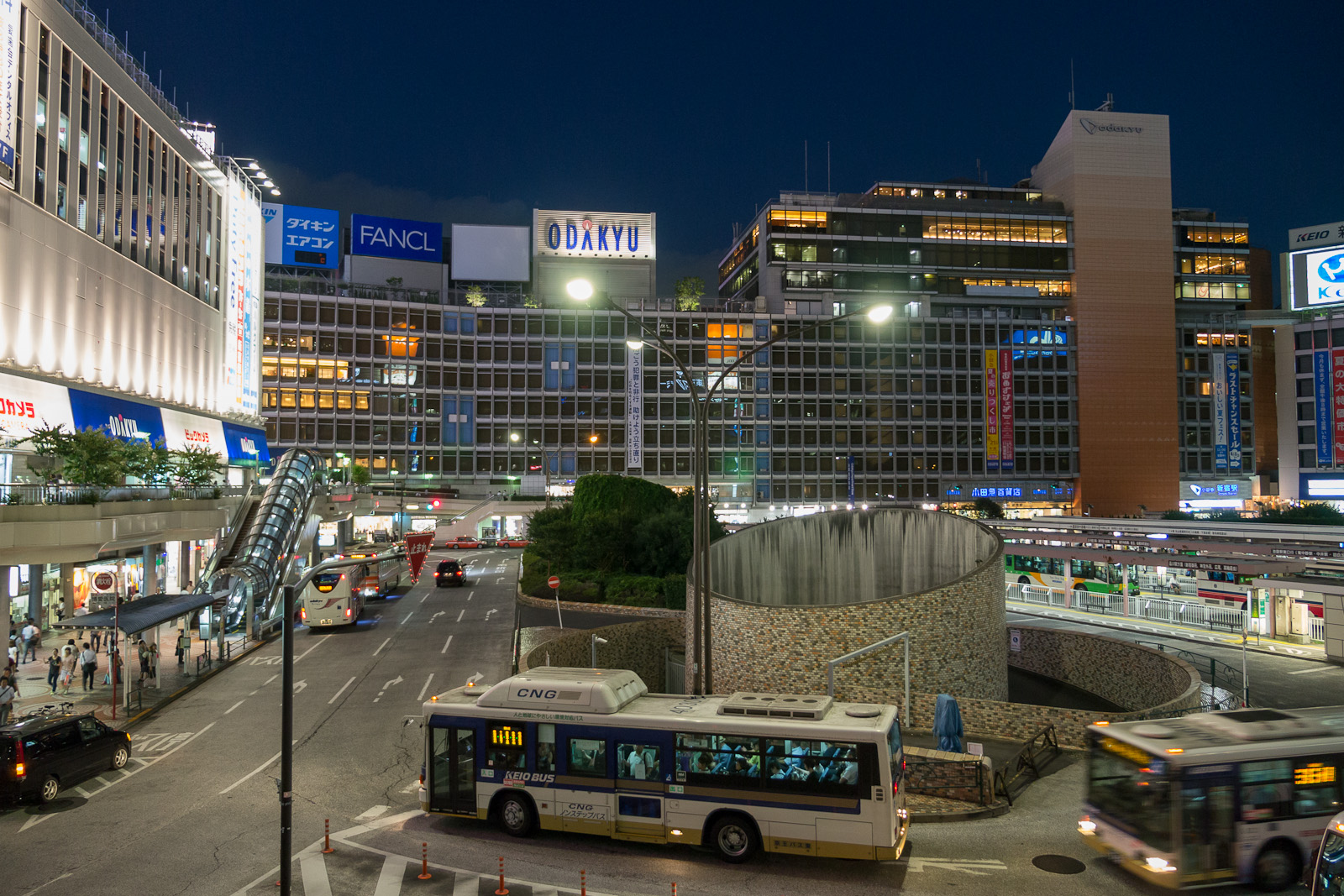 新宿駅西口広場と小田急百貨店。